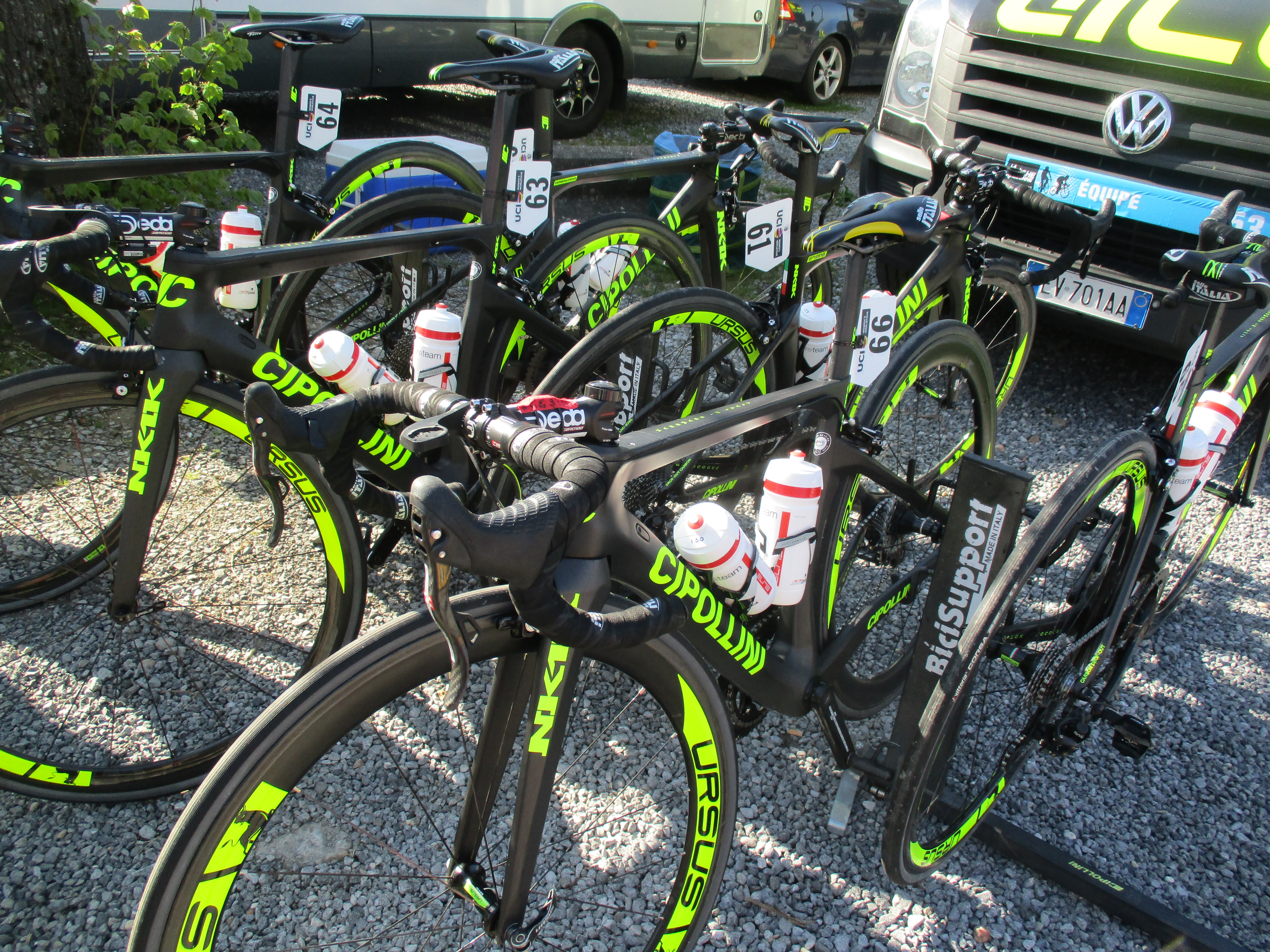 Start van de Waalse Pijl 2018 op de Mur van Huy.